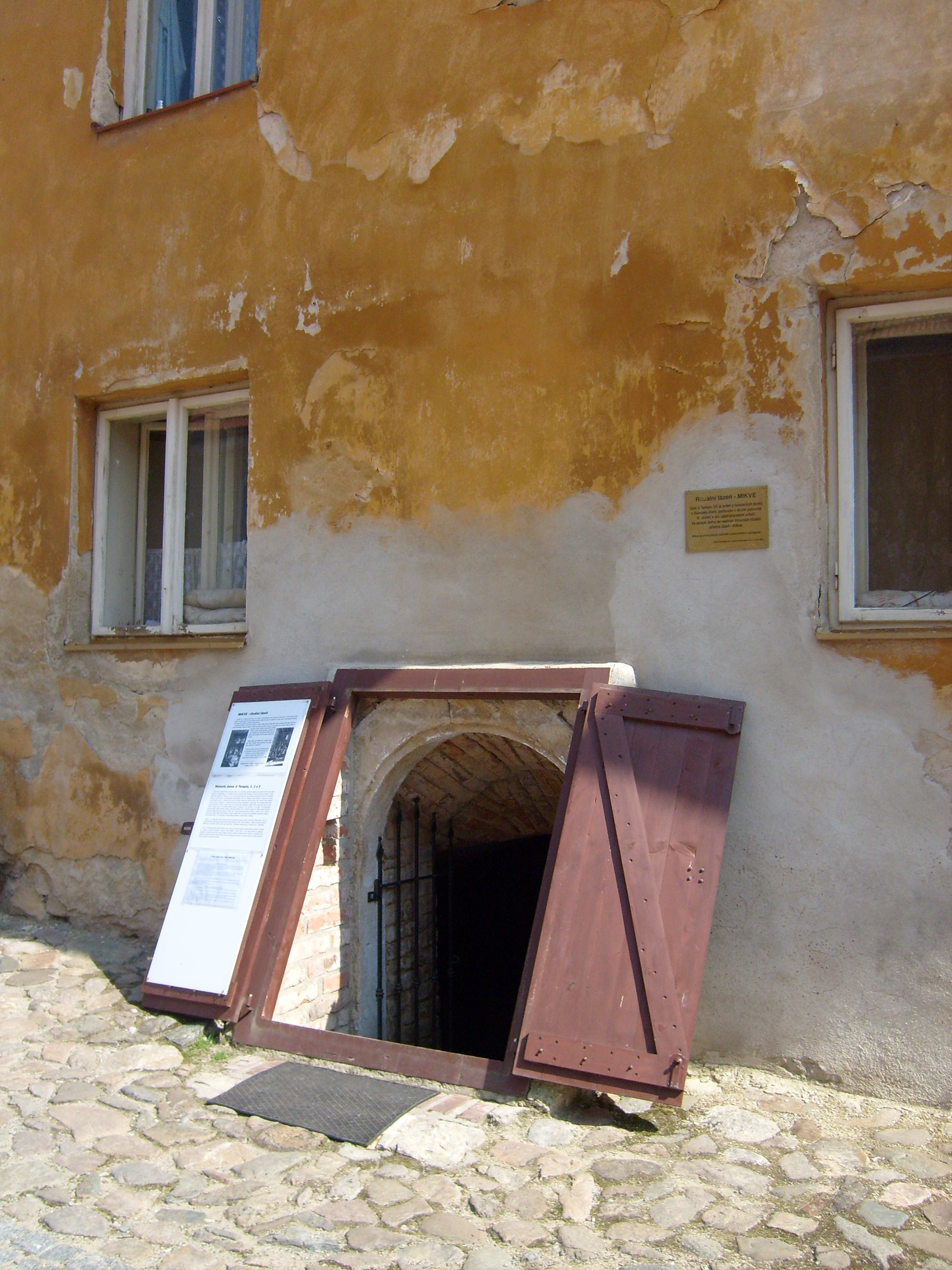 Vchod do rituální lázně Mikve v Boskovicích